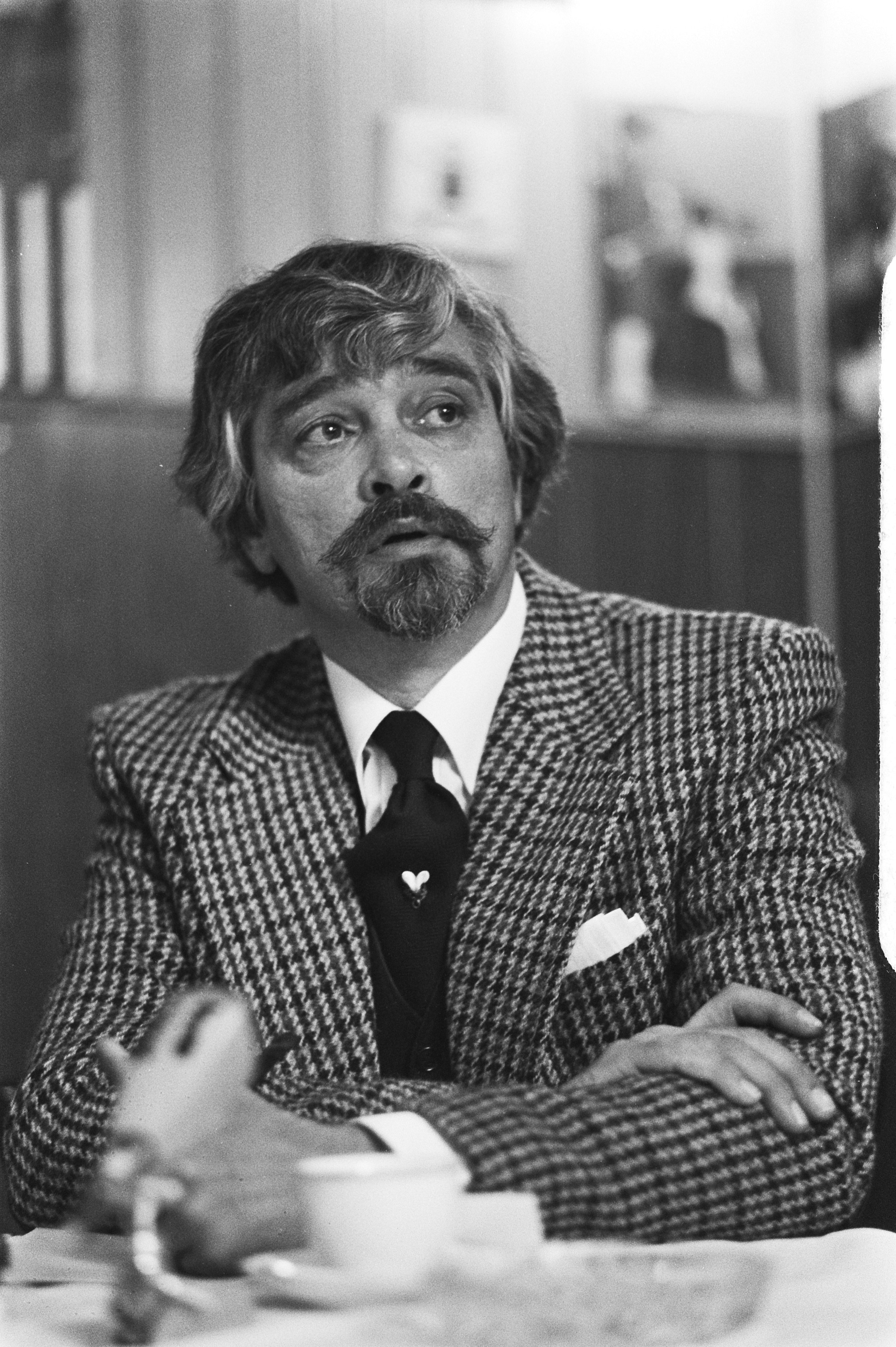 Collectie / Archief : Fotocollectie Anefo Reportage / Serie : [ onbekend ] Beschrijving : Eerste exemplaar boek Rien Poortvliet voor Prins Bernhard ; presentatie Datum : 18 mei 1978 Trefwoorden : boeken, presentaties, prinsen, schrijvers Persoonsnaam : Bernhard (prins Nederland), Poortvliet, Rien Fotograaf : Suyk, Koen / Anefo Auteursrechthebbende : Nationaal Archief Materiaalsoort : Negatief (zwart/wit) Nummer archiefinventaris : bekijk toegang 2.24.01.05 Bestanddeelnummer : 929-7255